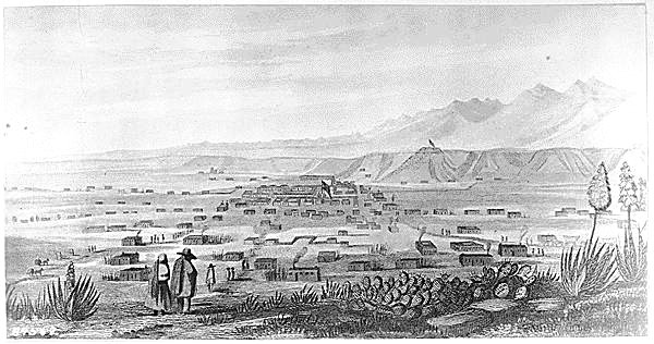 Santa Fe in 1846/47